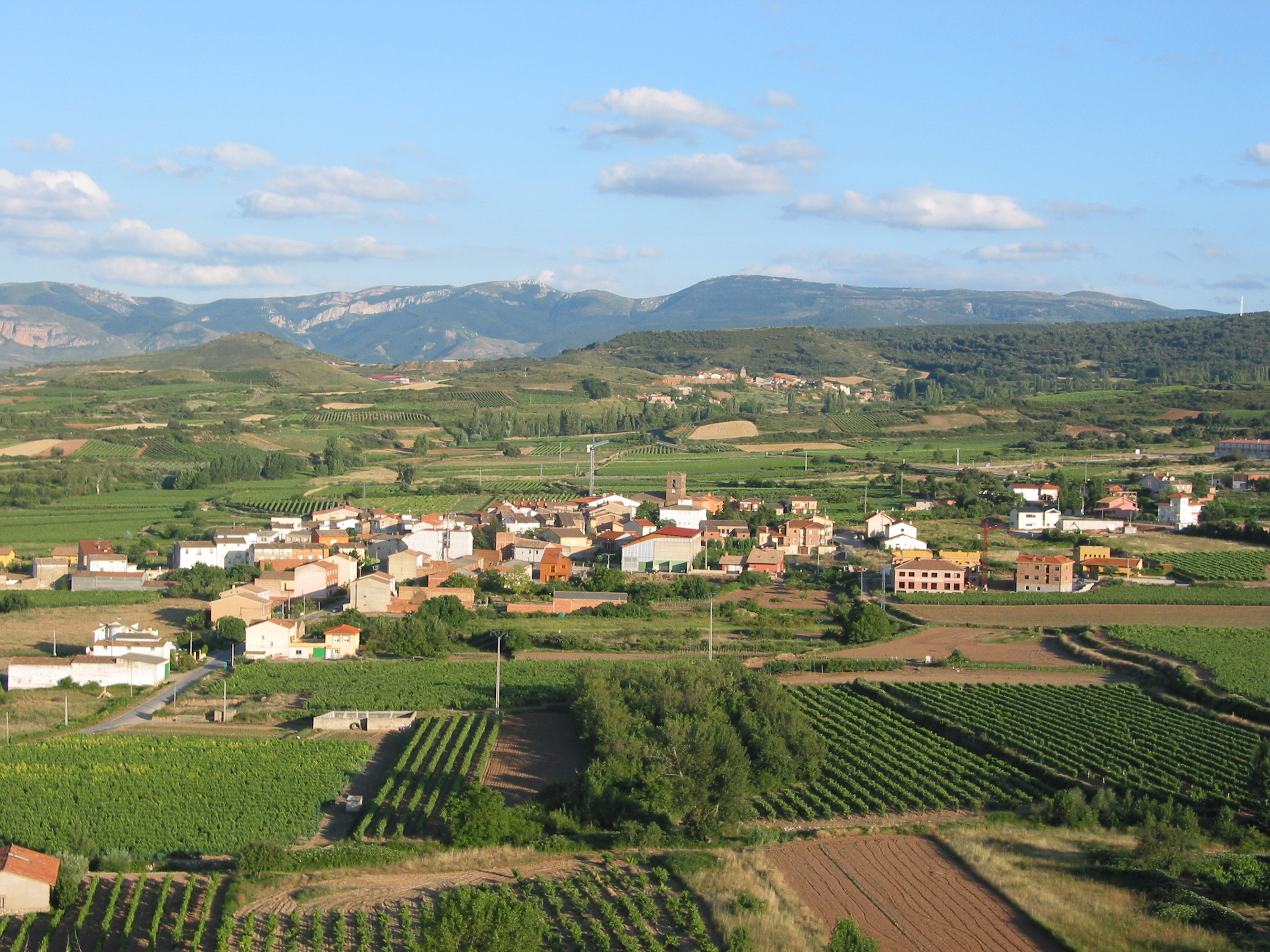 Vista panorámica de Medrano, La Rioja